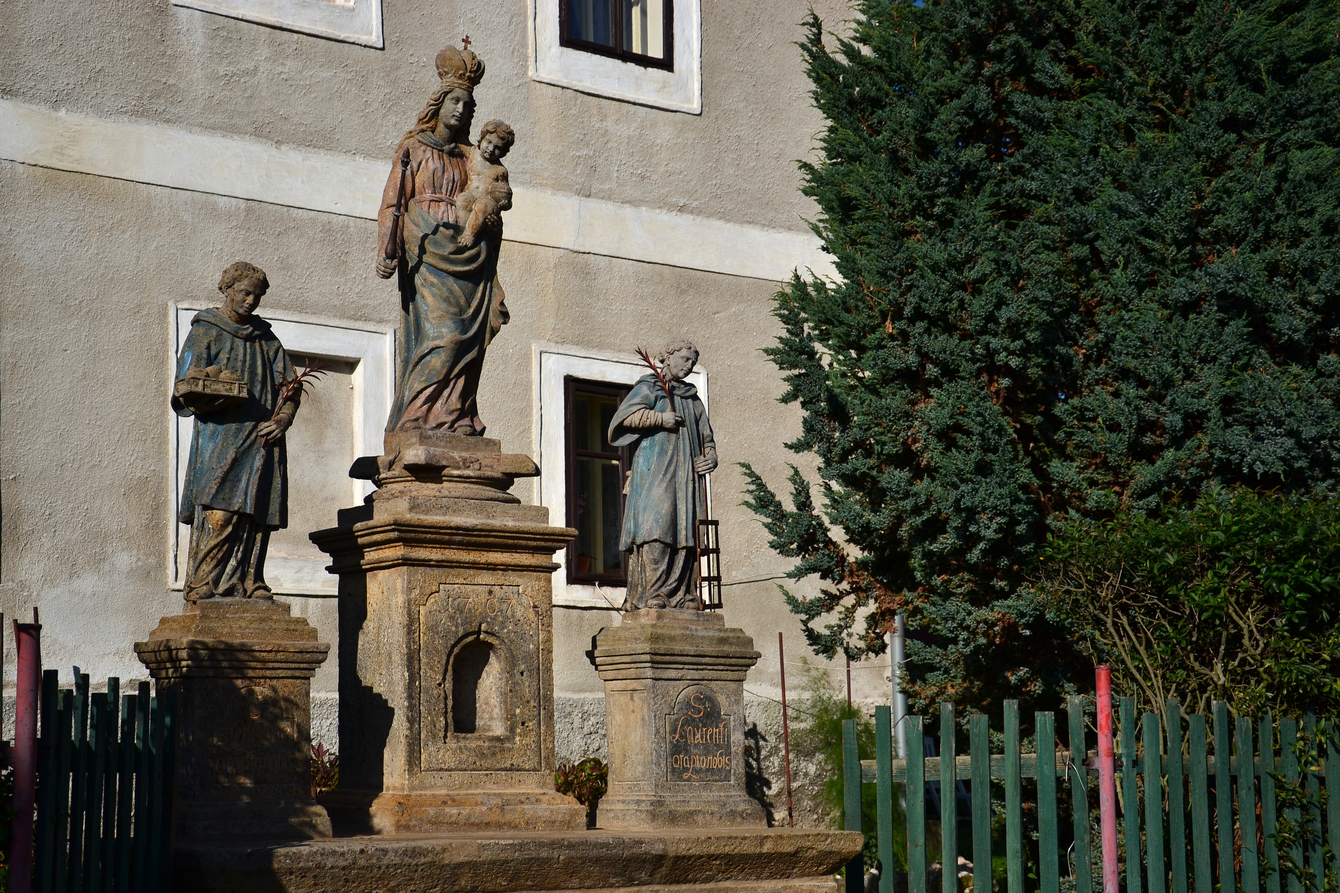 Sochy - soubor soch P. Marie, sv. Štěpána a sv. Vavřince (Okounov), před čp. 2, Okounov